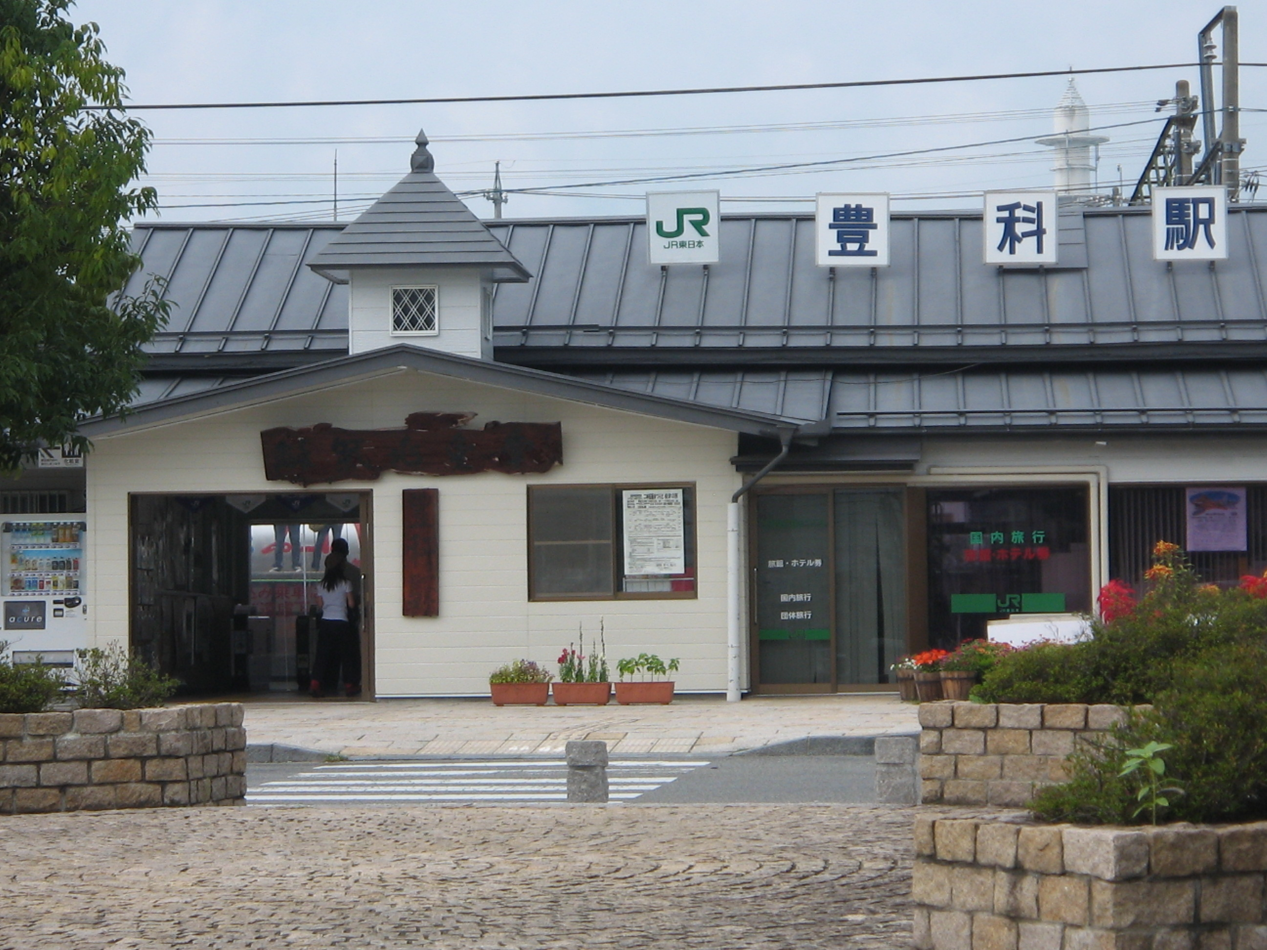 JR東日本大糸線豊科駅駅舎